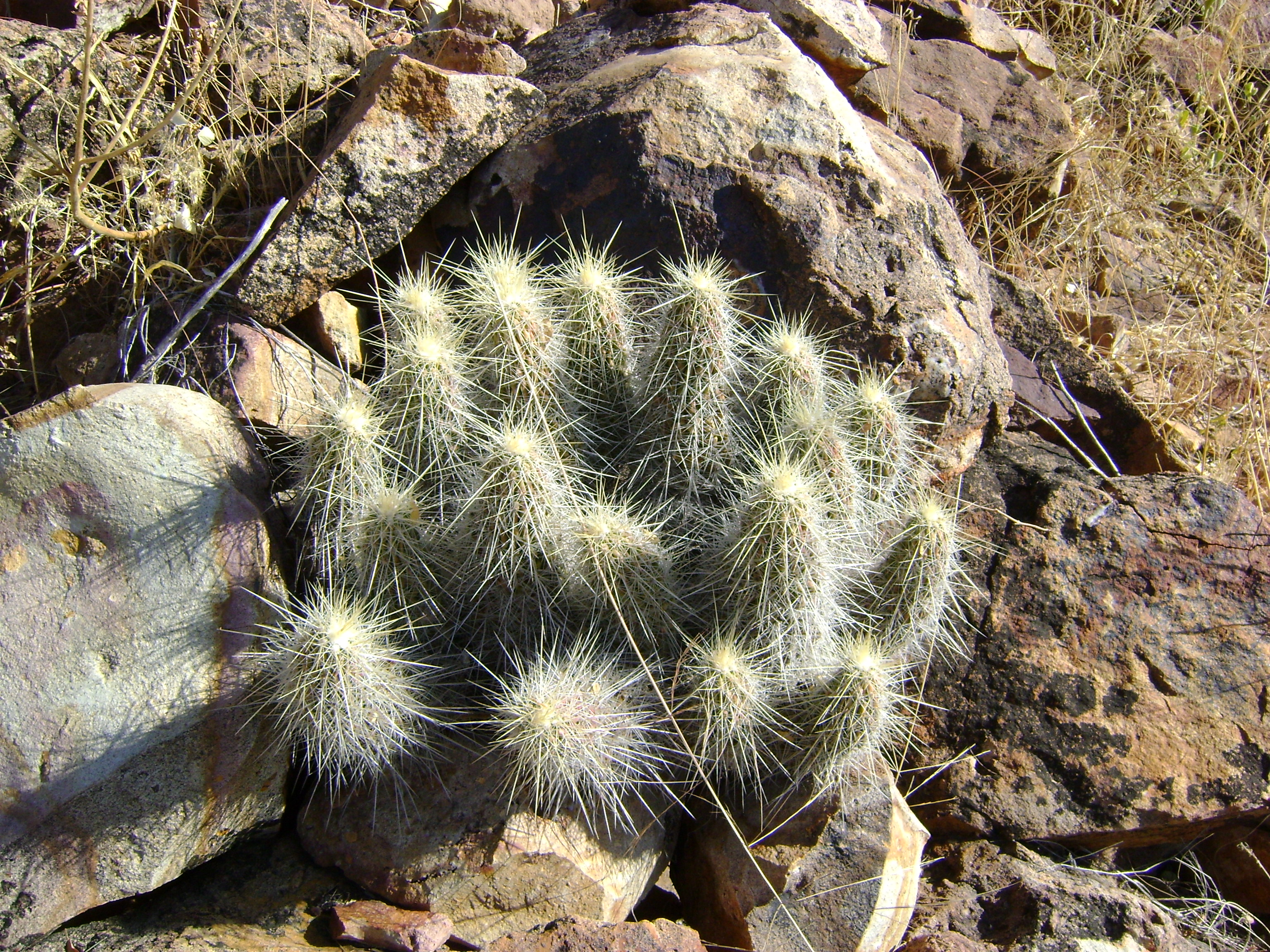 Rio Nazas, Durango